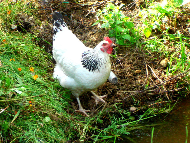 Kura domowa